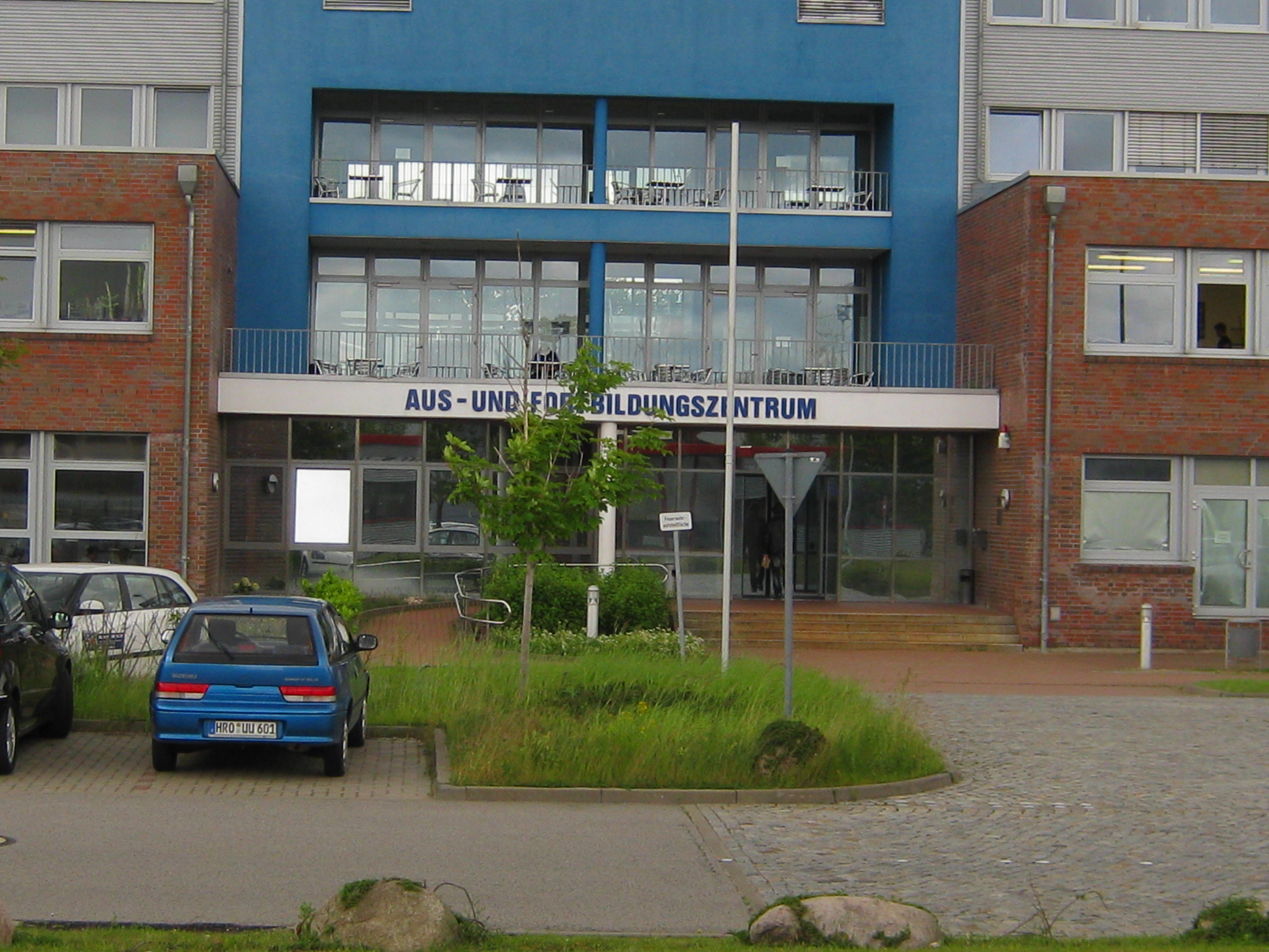 Eingang des Aus- und Fortbildungszentrums Rostock GmbH